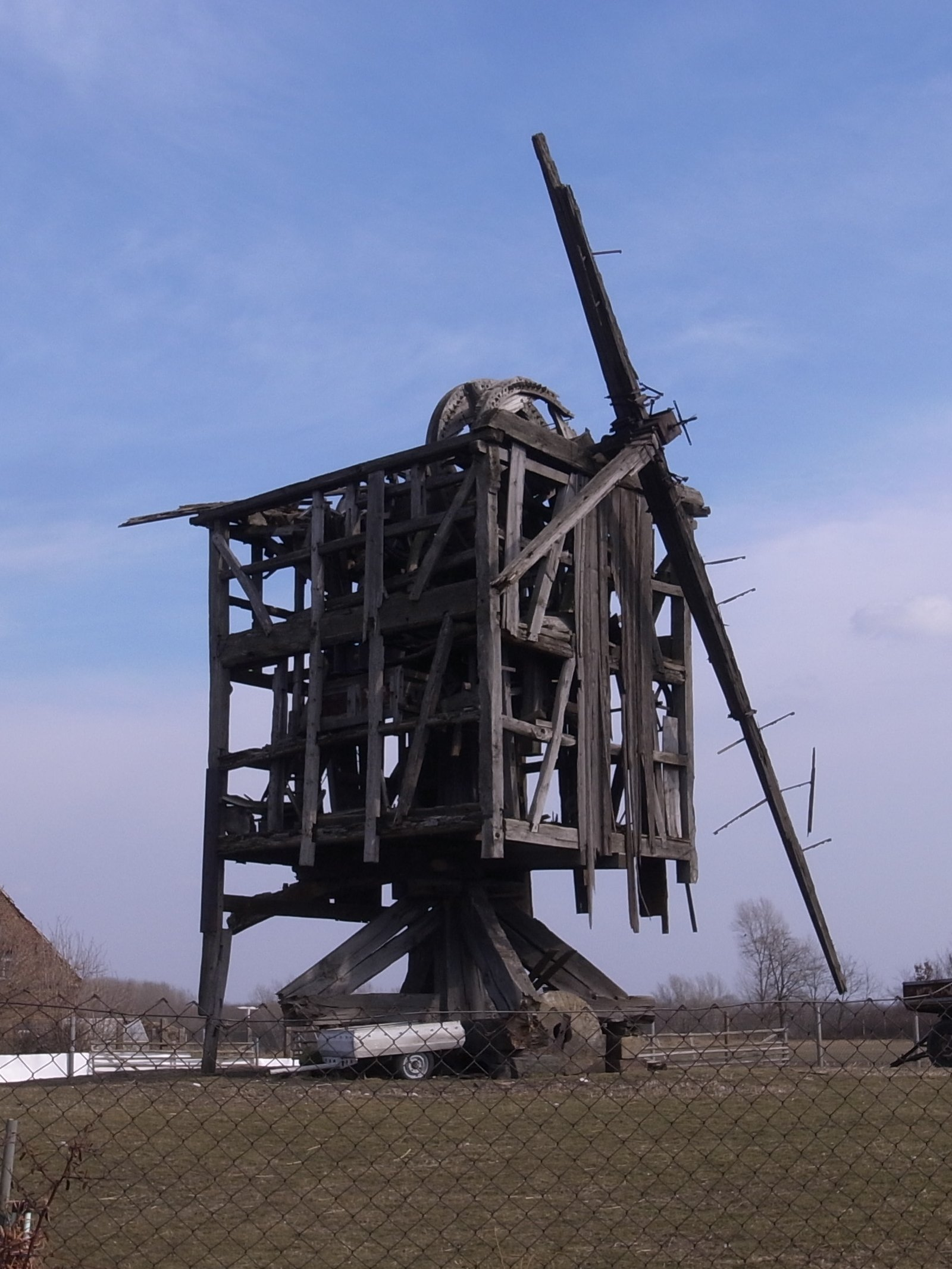 Wengelsdorf,Bockwindmühle